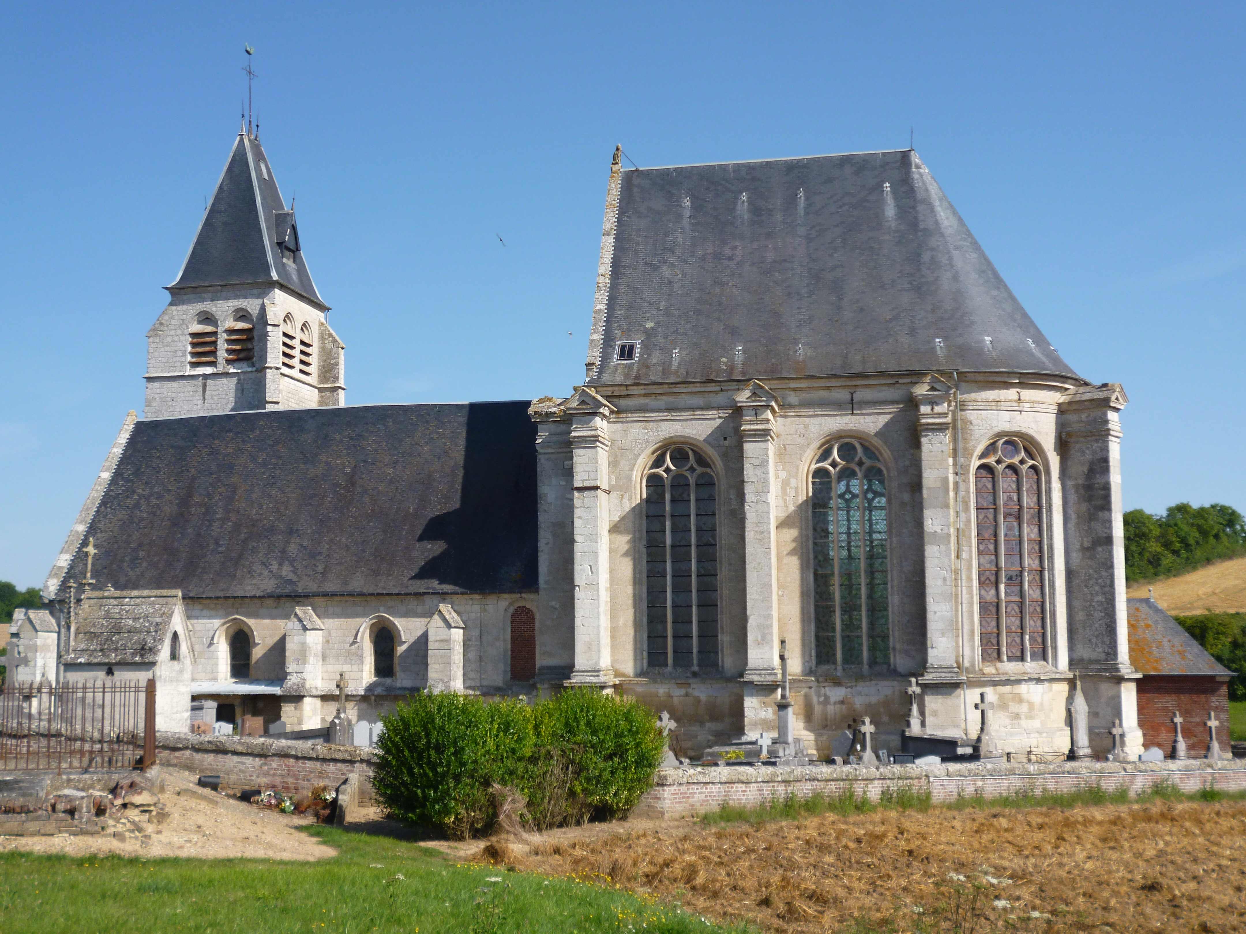 L'église Saint-André, située sur la commune de Saint-André-Farivillers (Oise, Picardie). Inscrite aux MH depuis 1992. .